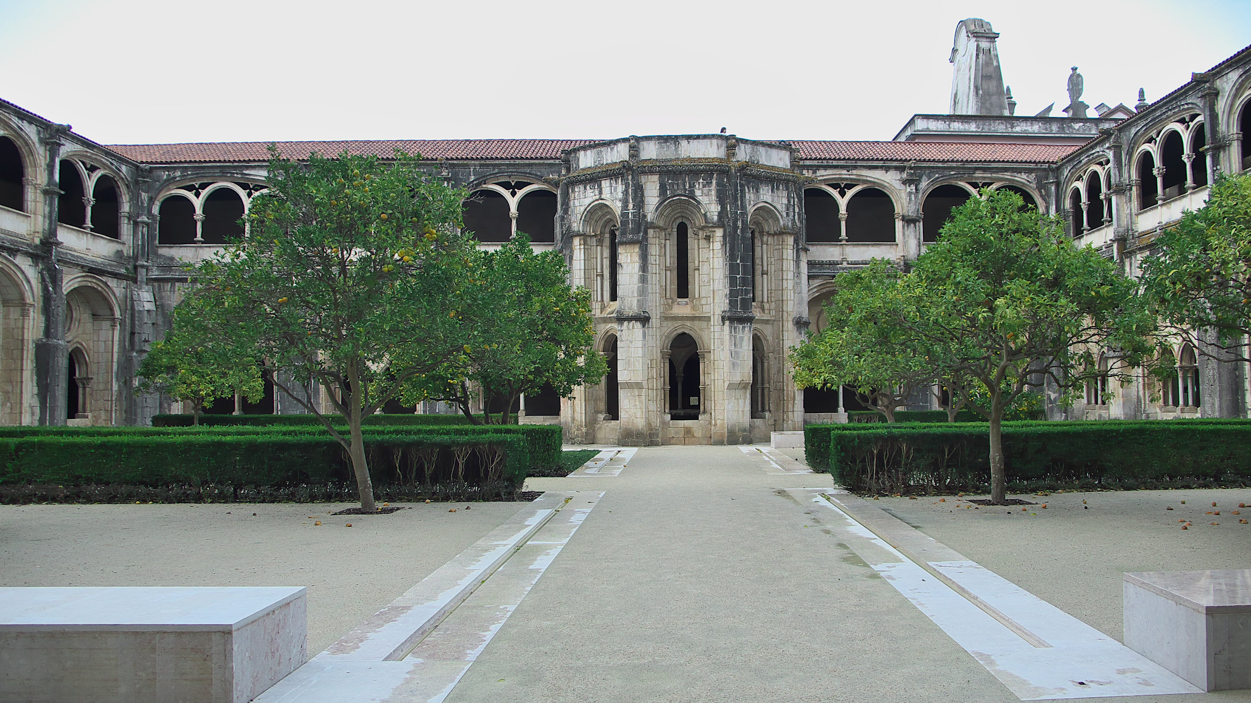 Posiblemente, entre los de mayores dimensiones del siglo XIV.